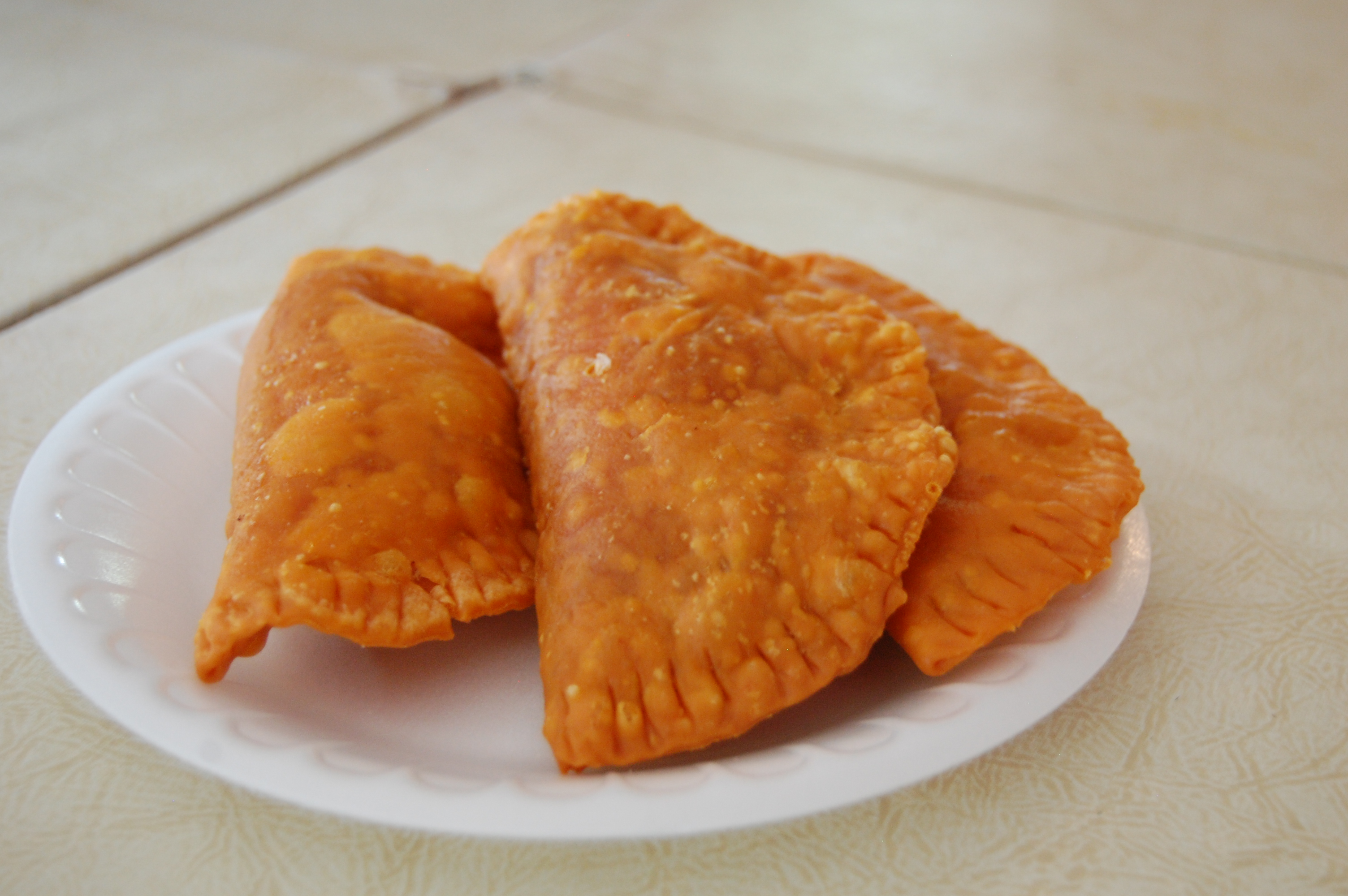 Empanadillas mit Kalbfleisch.